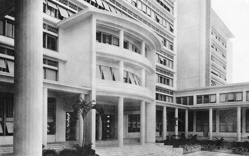 Siège du Gouvernement général d'Alger, époque coloniale. Construit en 1929.